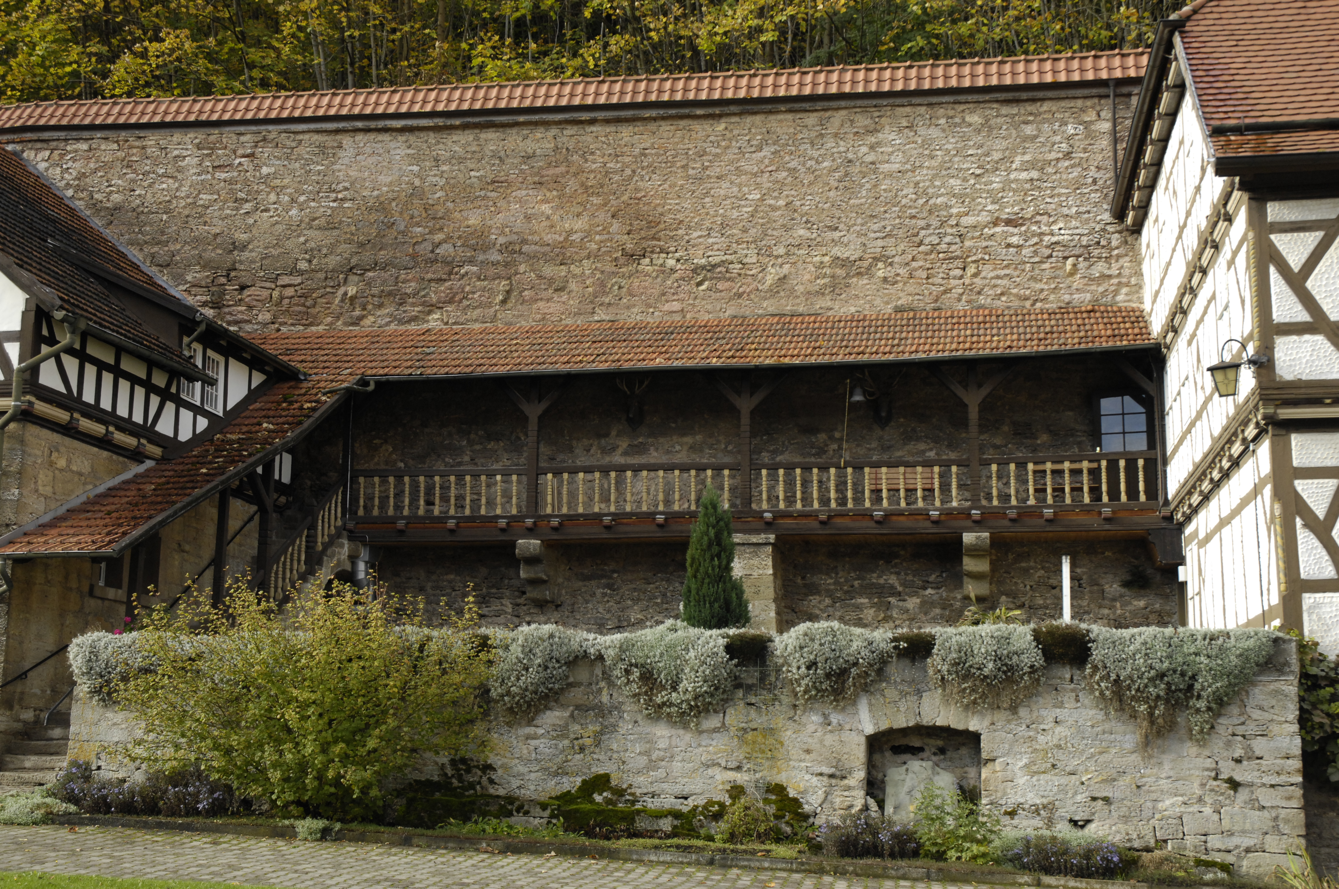 Kloster Zella, Innenhof